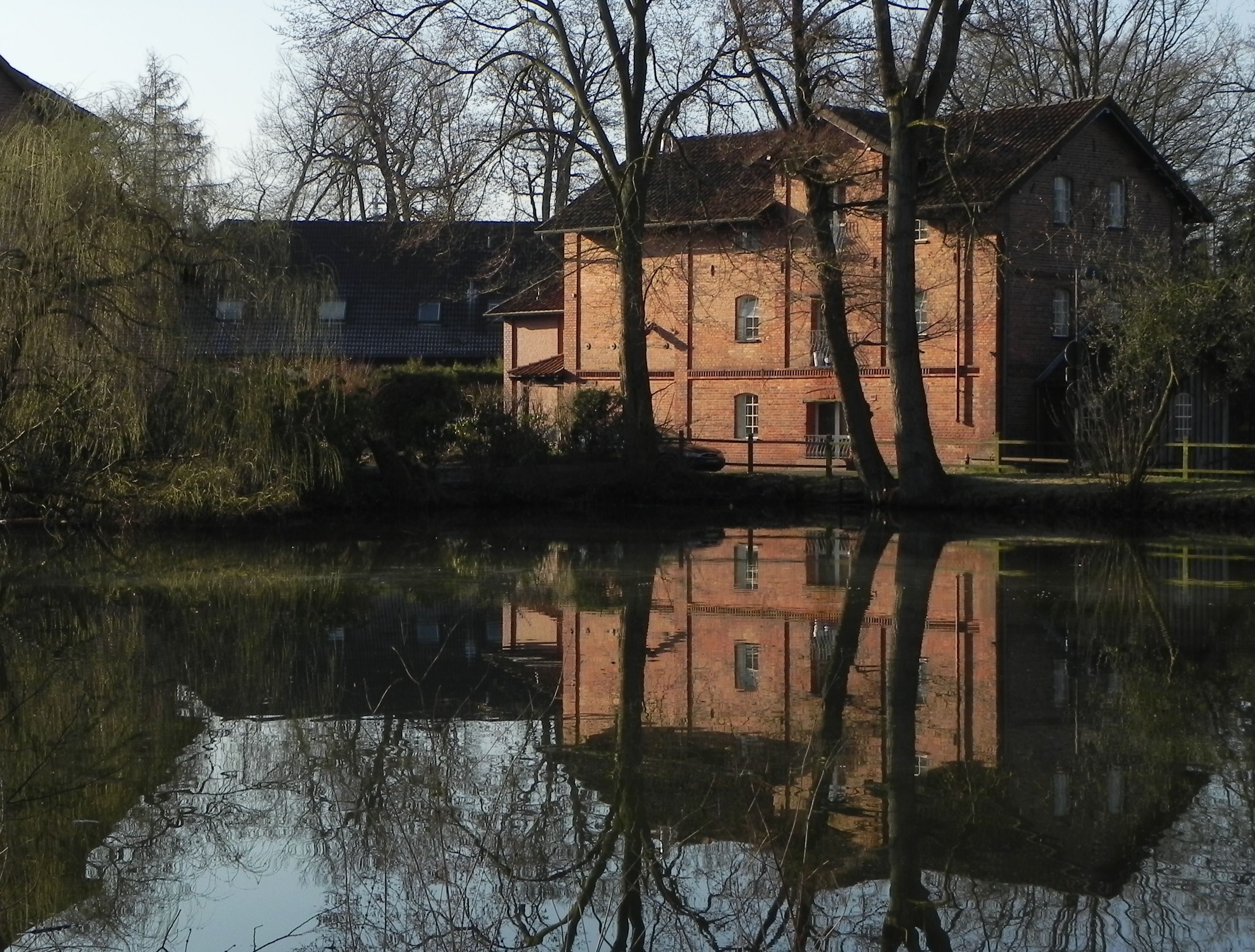 ehemalige Wassermühle (lt. Balkeninschrift von 1470) mit Mühlenteich, in Bergen (Landkreis Celle), Niedersachsen, Germany